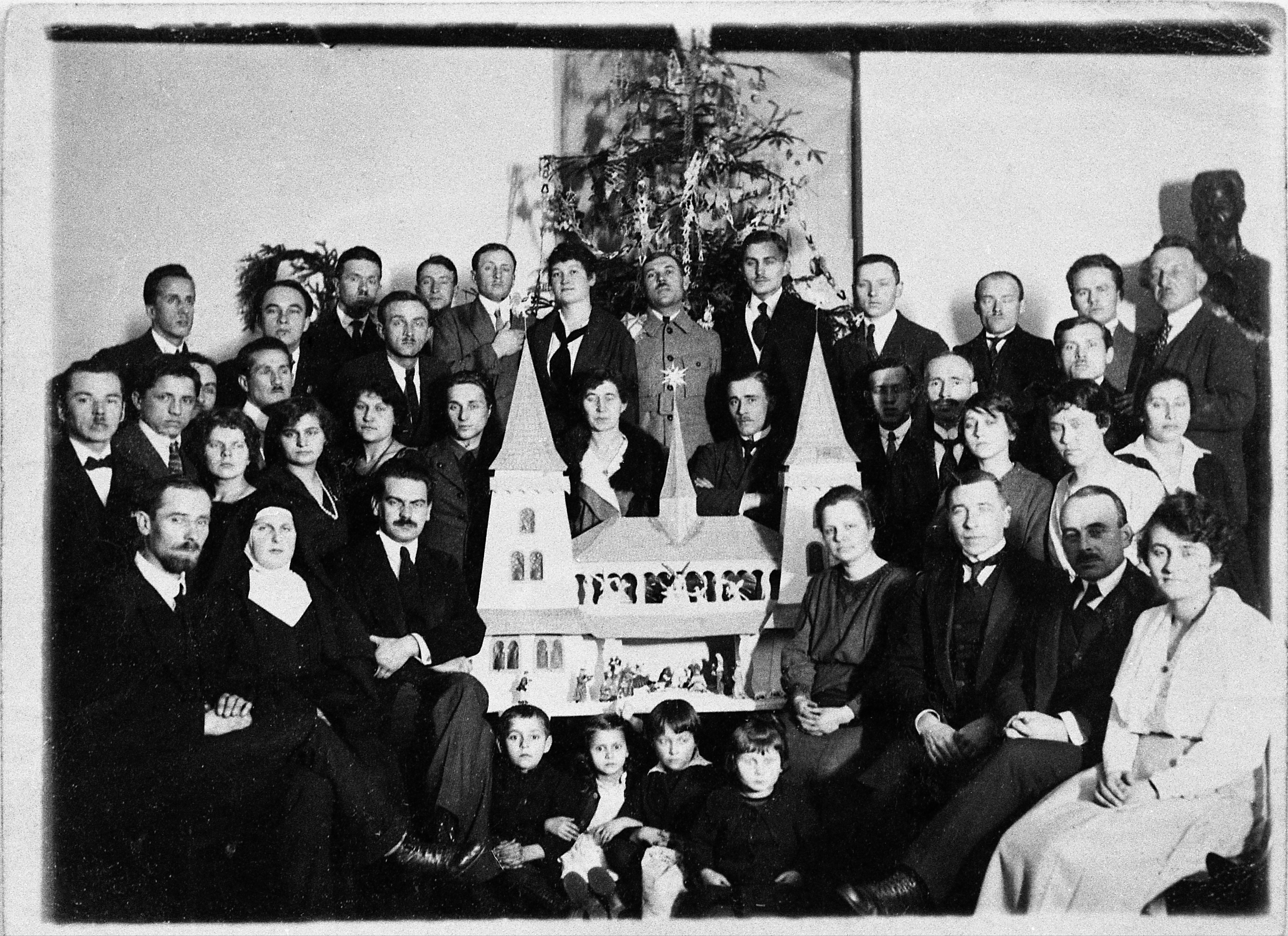 Słuchacze i nauczyciele WKN-u (Wyższy Kurs Nauczycielski). Na zdjęciu między innymi: Władysław Przanowski, żona Teresa Przanowska, syn Jan Przanowski, Profesorowie: Marian Wojnarowicz, Feliks Wojnarowicz, Zygmunt Andrzejewski Stefan Lipski Walenty Czyżycki Słuchacze: Siostra Zakonna Ida Zofia Rutkowska Pietrzykowska Maria Krause, później Holska Bronisława Balukiewicz